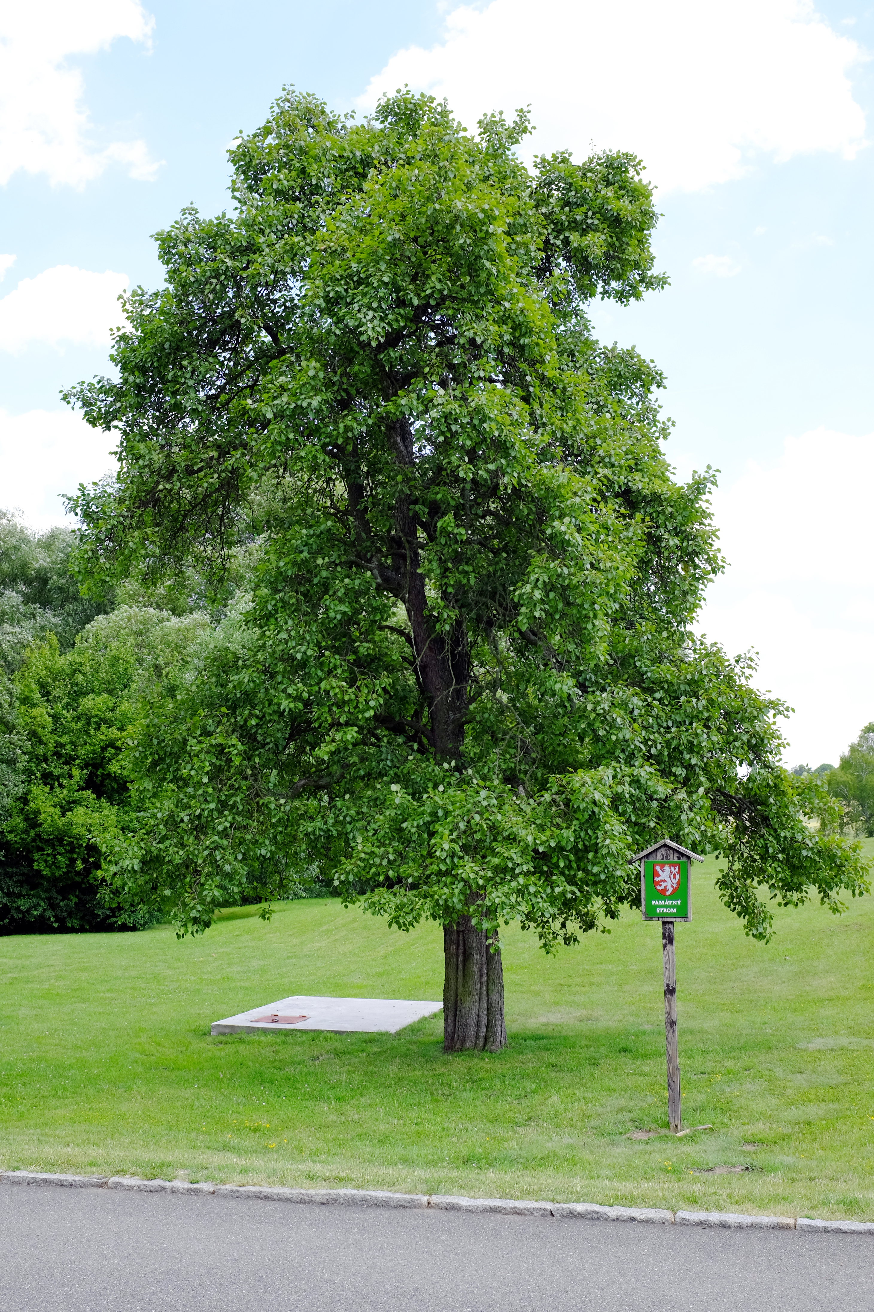 Památník Lidice, Lidice.